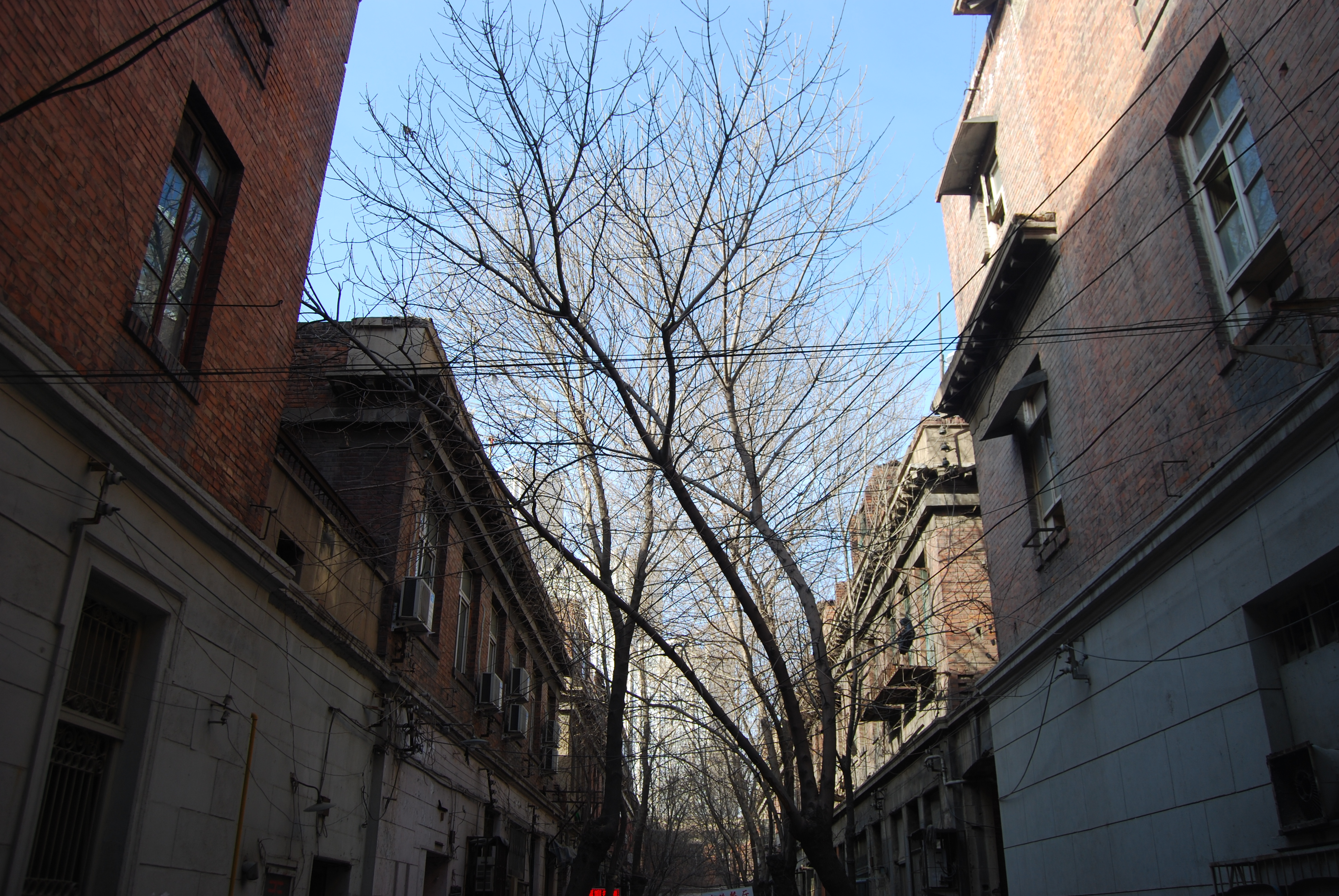 杨福荫路